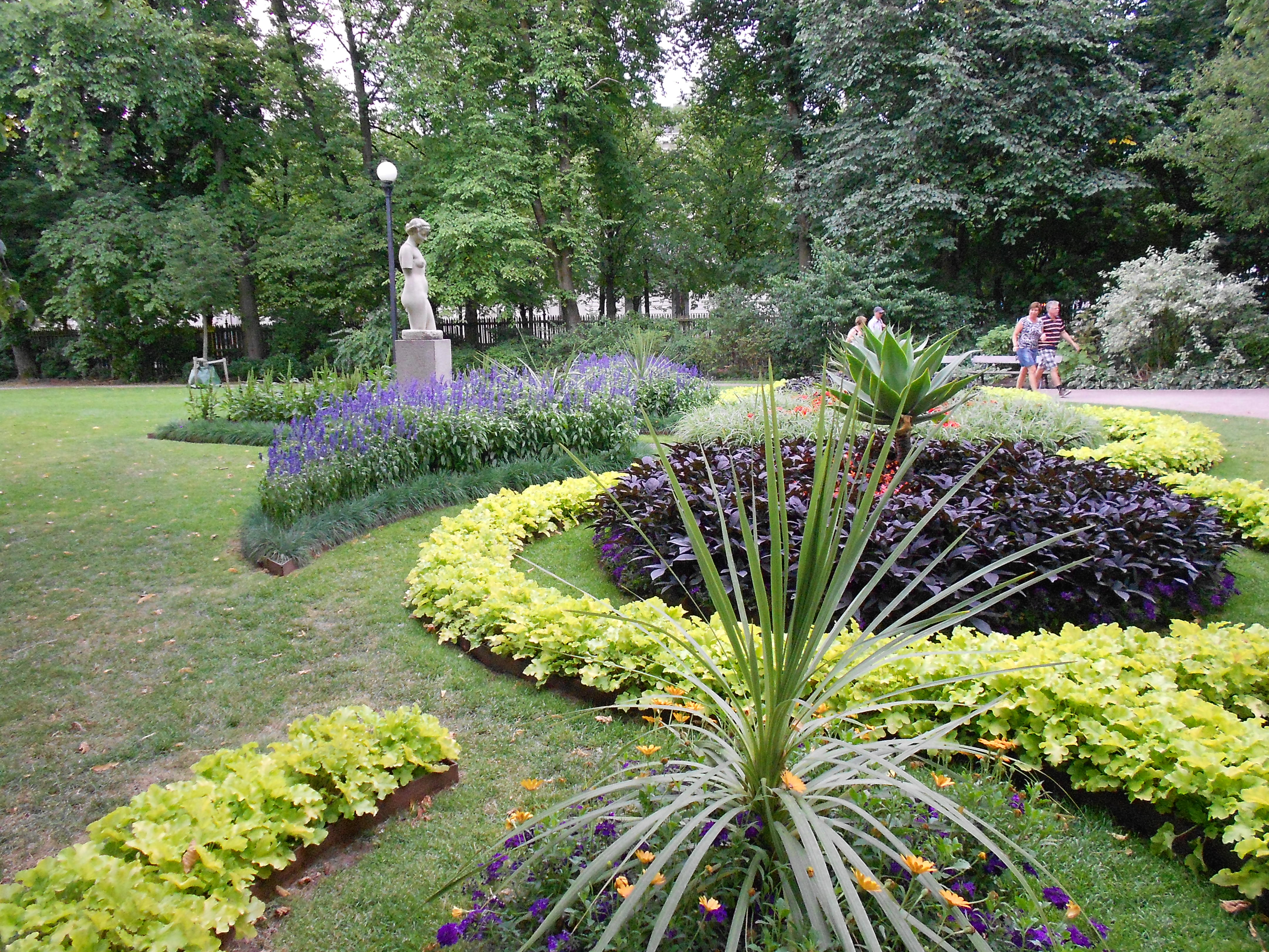 Göteborg, Tradgardsforeningen (particolare)